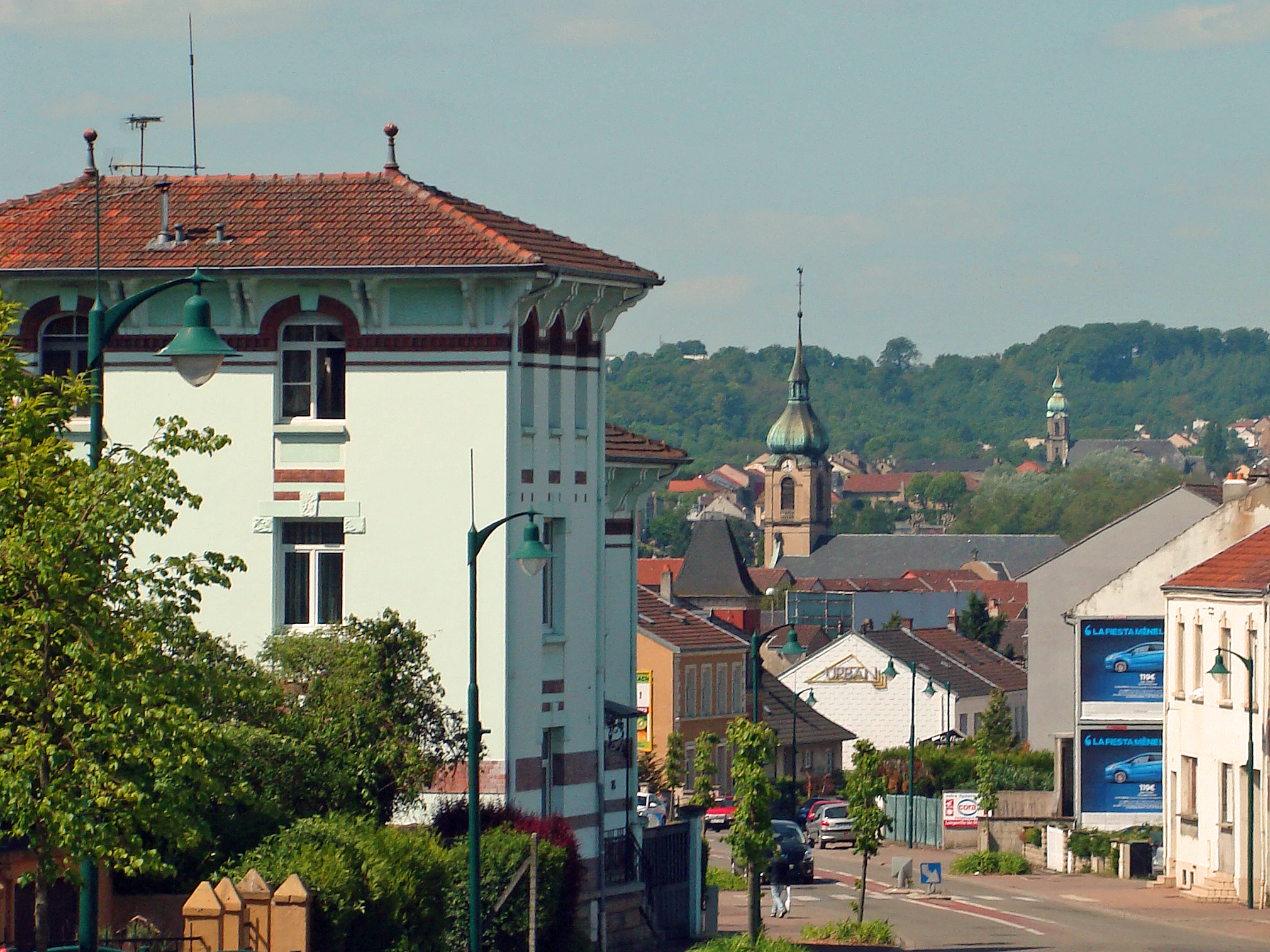 Freyming-Merlebach, vue générale avec les deux églises